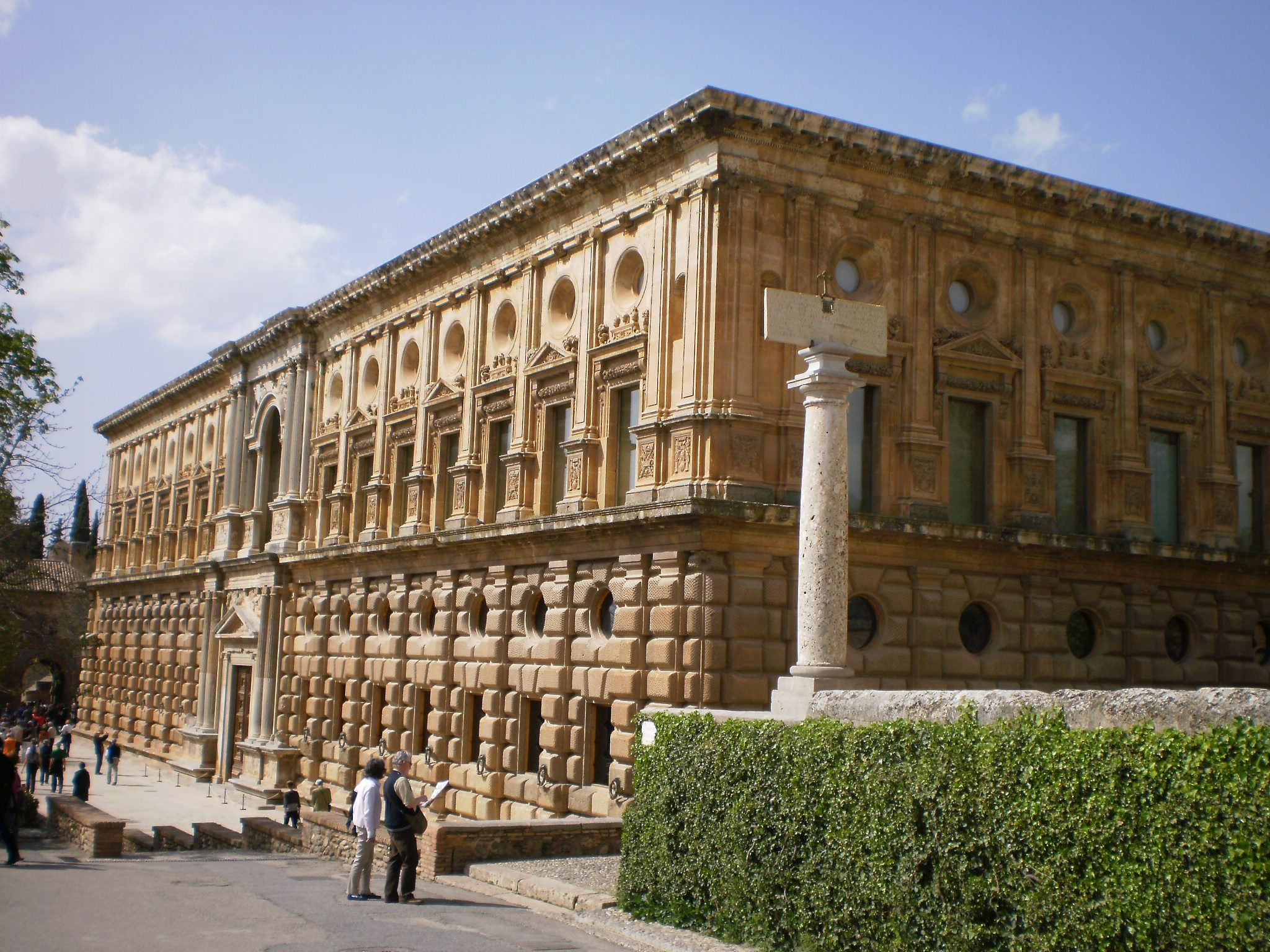 Palacio de Carlos V, Alhambra, Granada